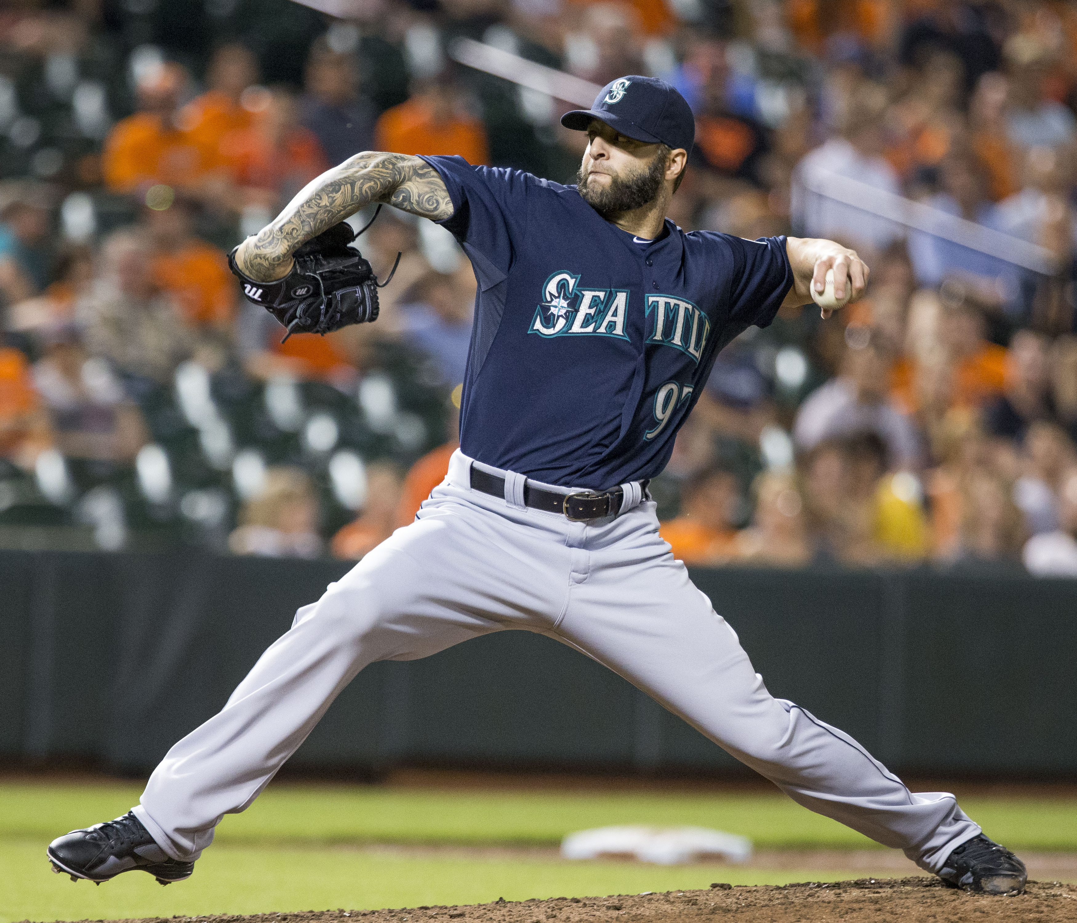 Joe Beimel